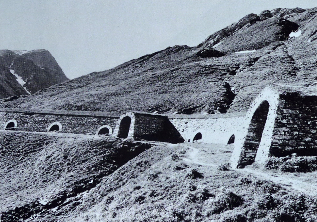 Galerie am Splügenpass vor dem Bau der neuen Strasse